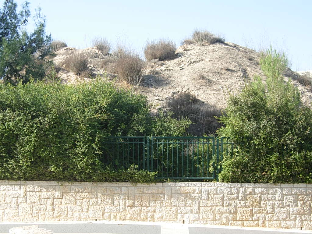 "Rogem" No.2, Masua, Jerusalem